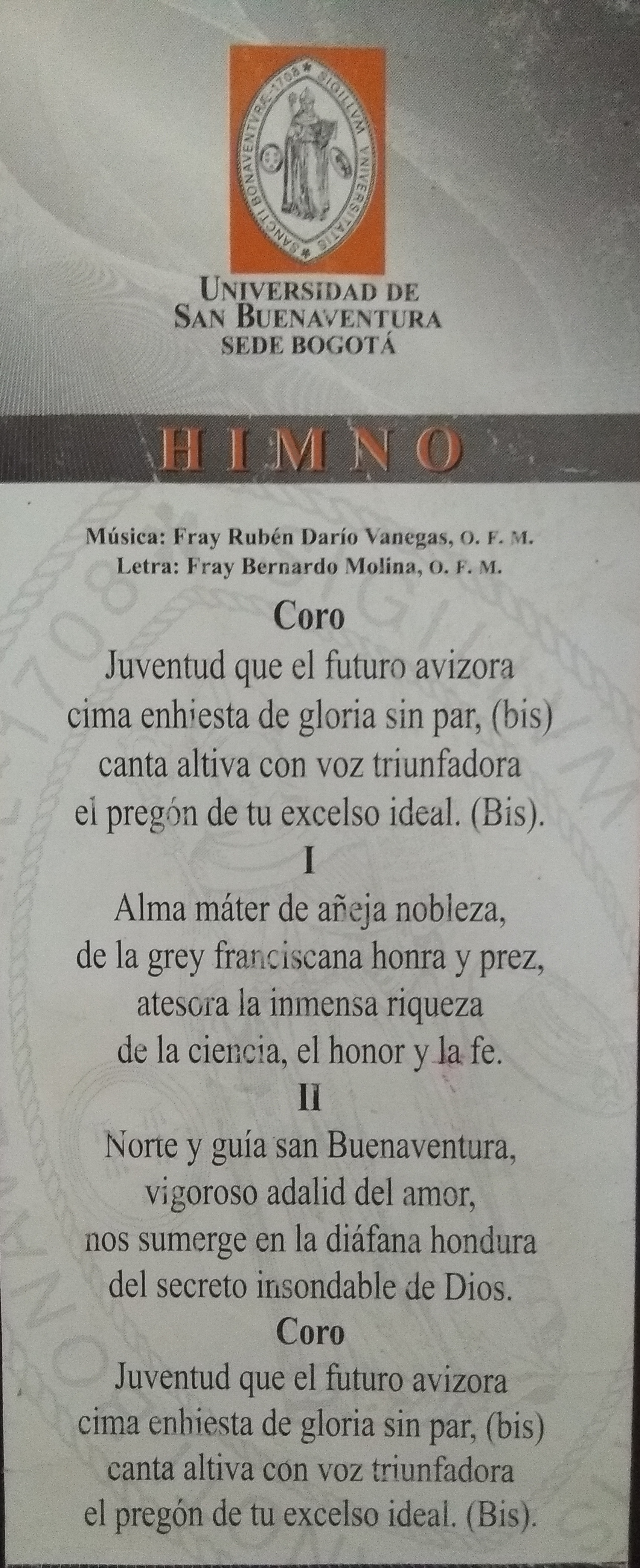 Imagen que contiene escudo y el himno de la U. de San Buenaventura.